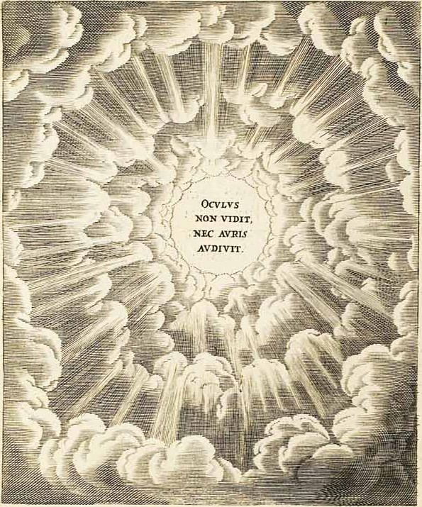 Emblem: OCVLVS NON VIDIT, NEC AVRIS AVDIVIT. ("Kein Auge hat gesehen und kein Ohr gehört [was Gott denen bereitet hat, die ihn lieben]"; 1 Kor 2,9). Aus: "Amoris Divini Emblemata Studio Et Aere Othonis Vaenii Concinnata", Antwerpen, Officina Plantiniana (Balthasar Moretus), 1660